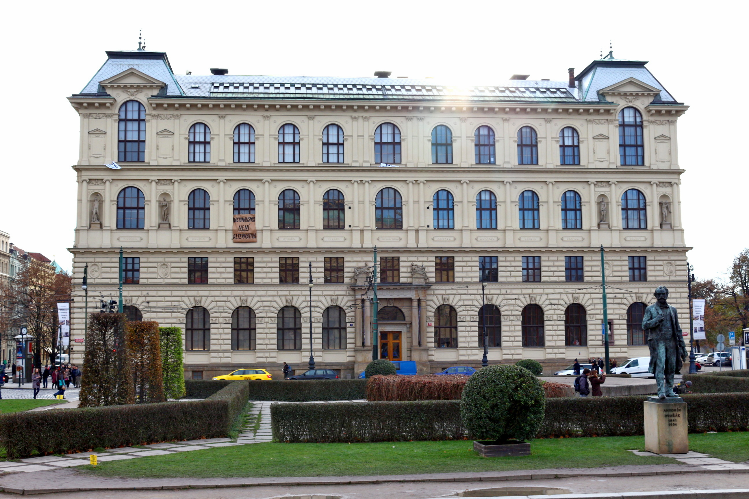 Vysoká škola uměleckoprůmyslová v Praze